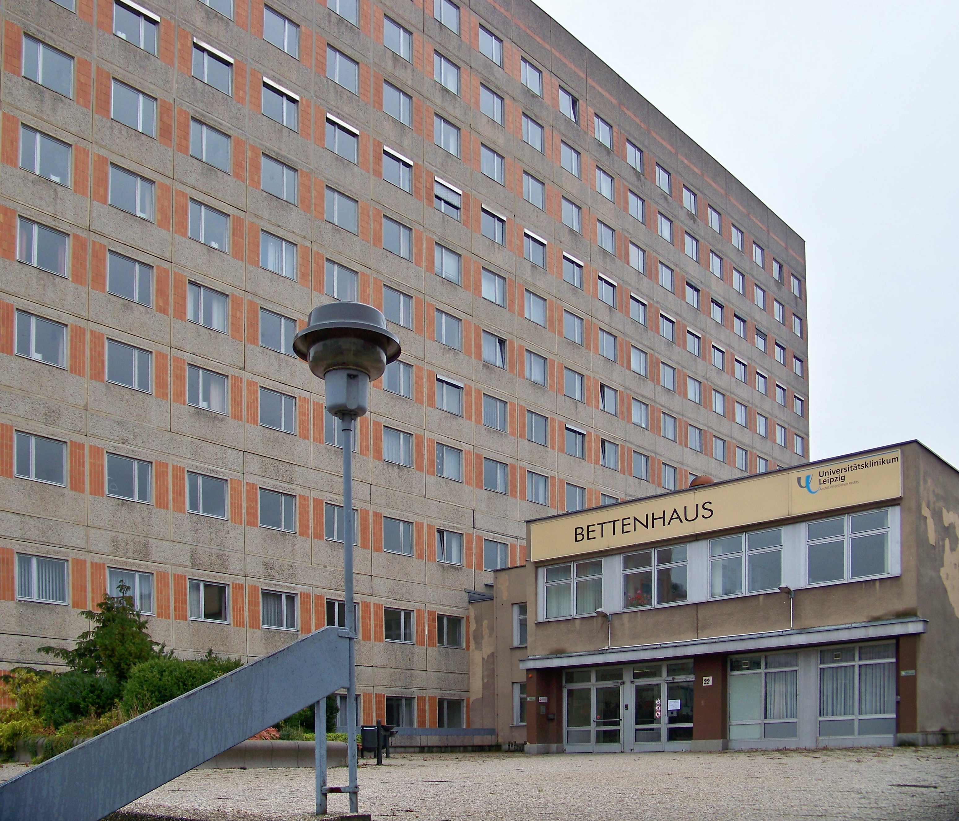 Bettenhaus des Universitätsklinikums Leipzig in der Liebigstraße 22 (1984 mit über 600 Betten eingeweiht), seit 2009 leerstehend, 2013 abgerissen